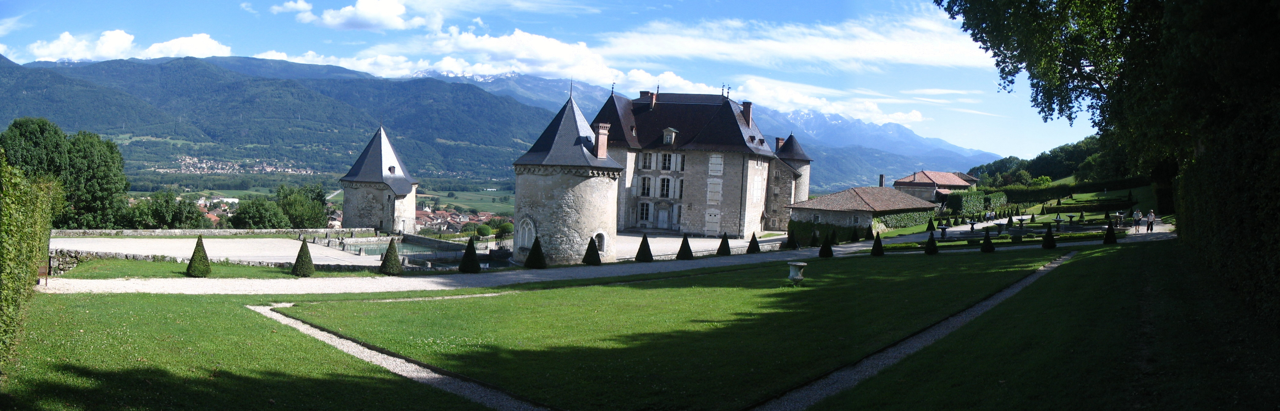 Château du Touvet - vue Panoramique